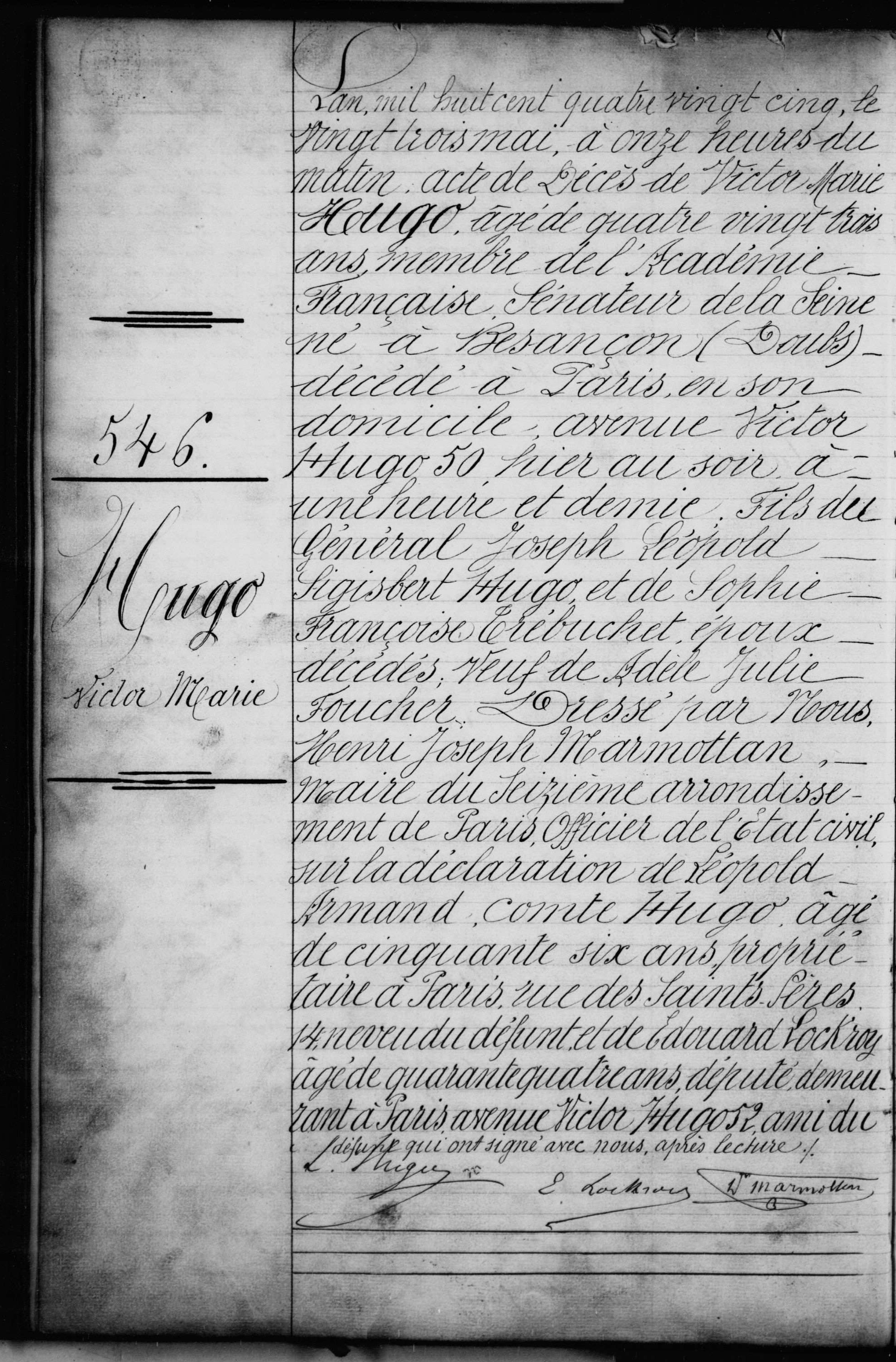 Acte de décès - Victor Hugo